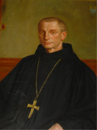 Abt Dom Robert de Kerchove (1846-1942) geboren te Bellem en overleden te Leuven - België